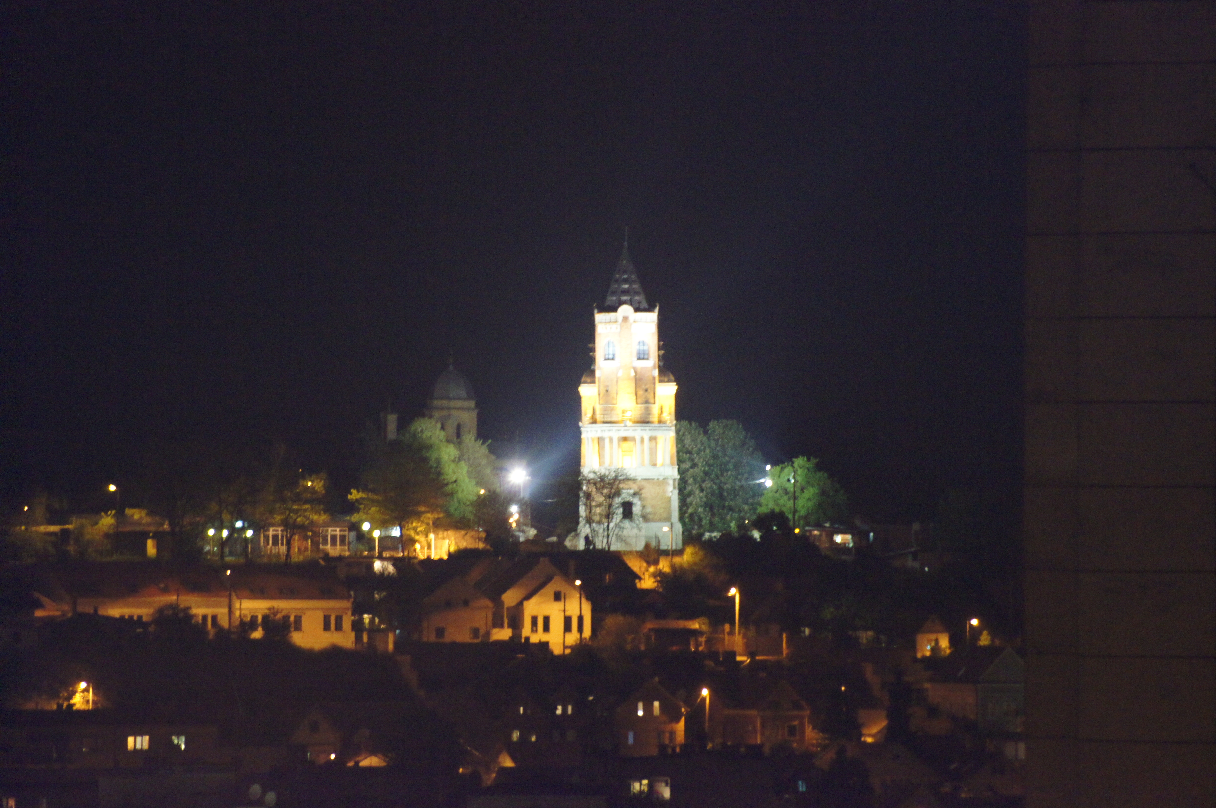 Gardos